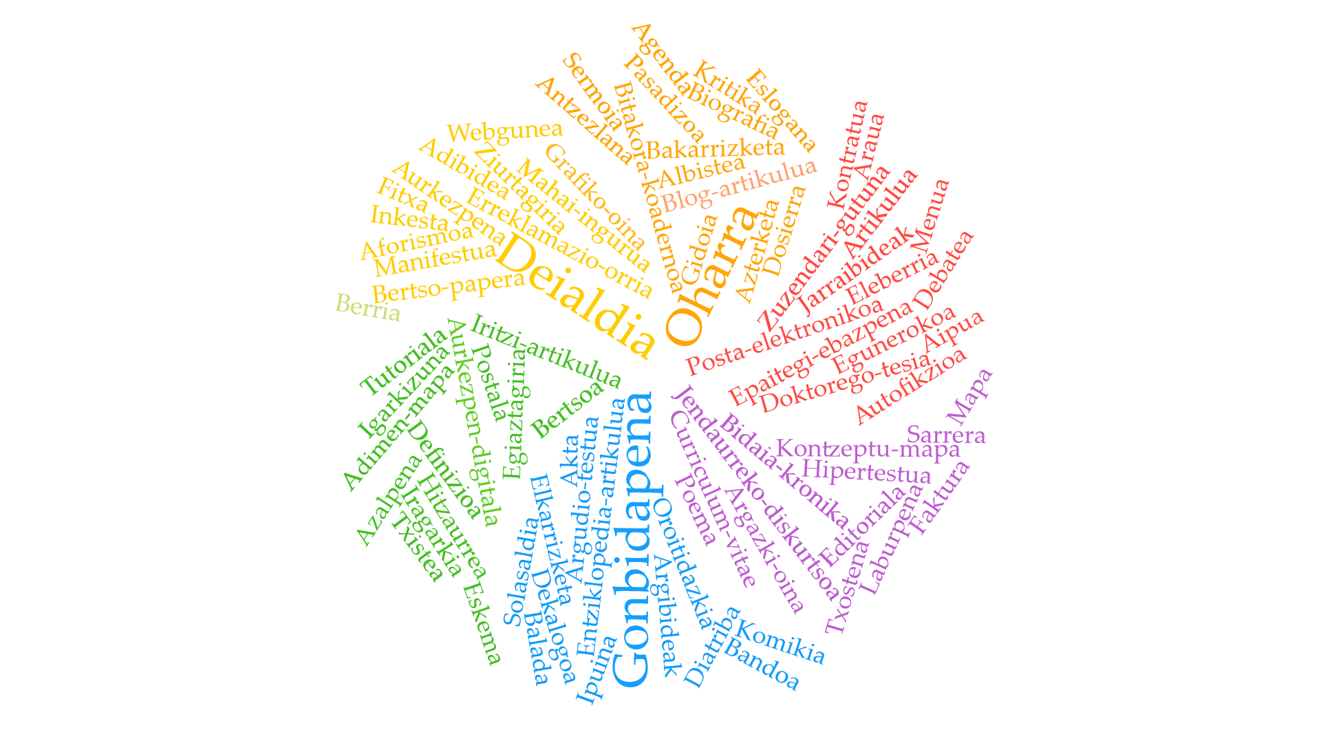 Testu mota batzuk